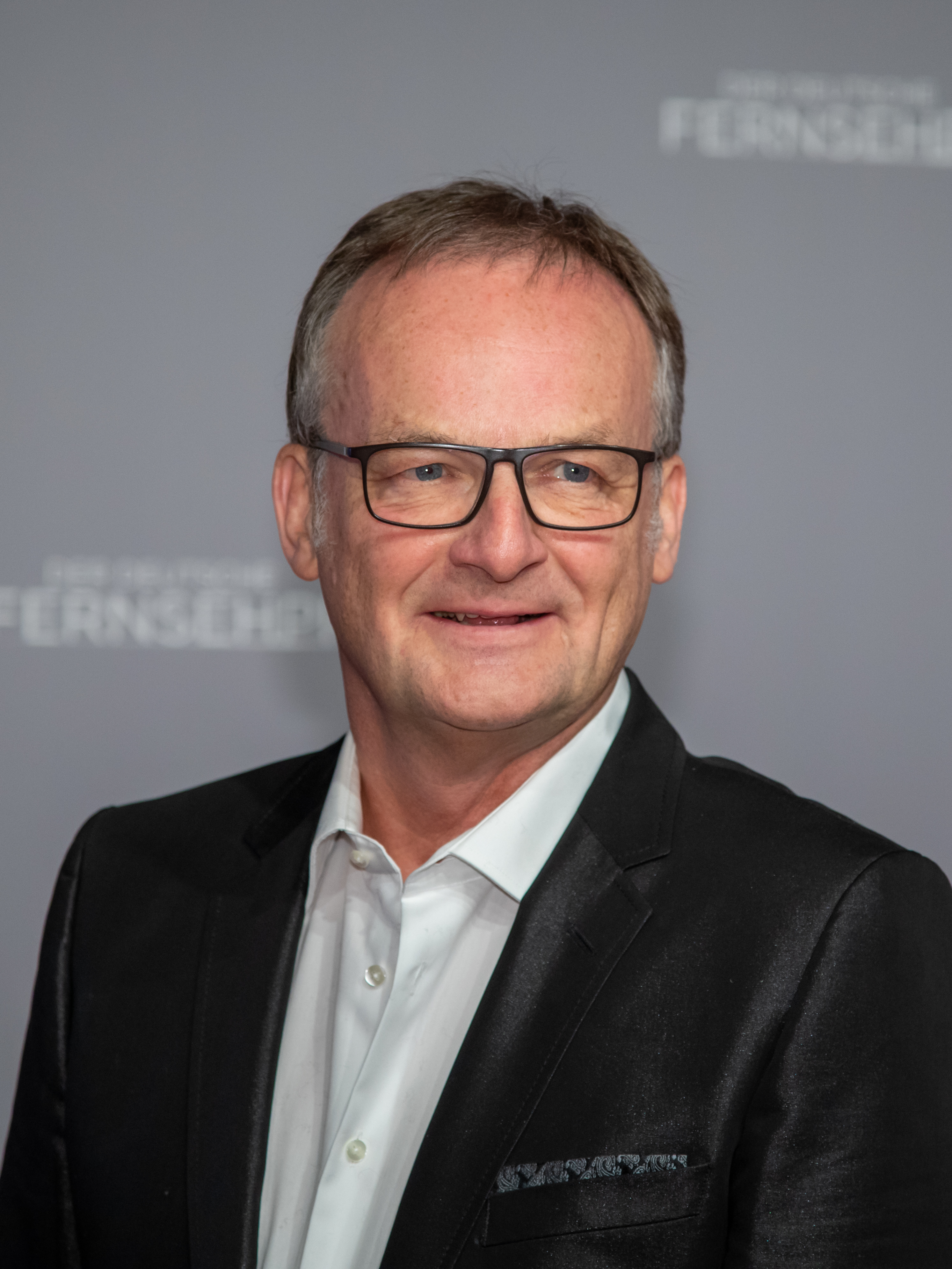 Frank Plasberg beim Deutschen Fernsehpreis 2019 in der Düsseldorfer Rheinterrasse